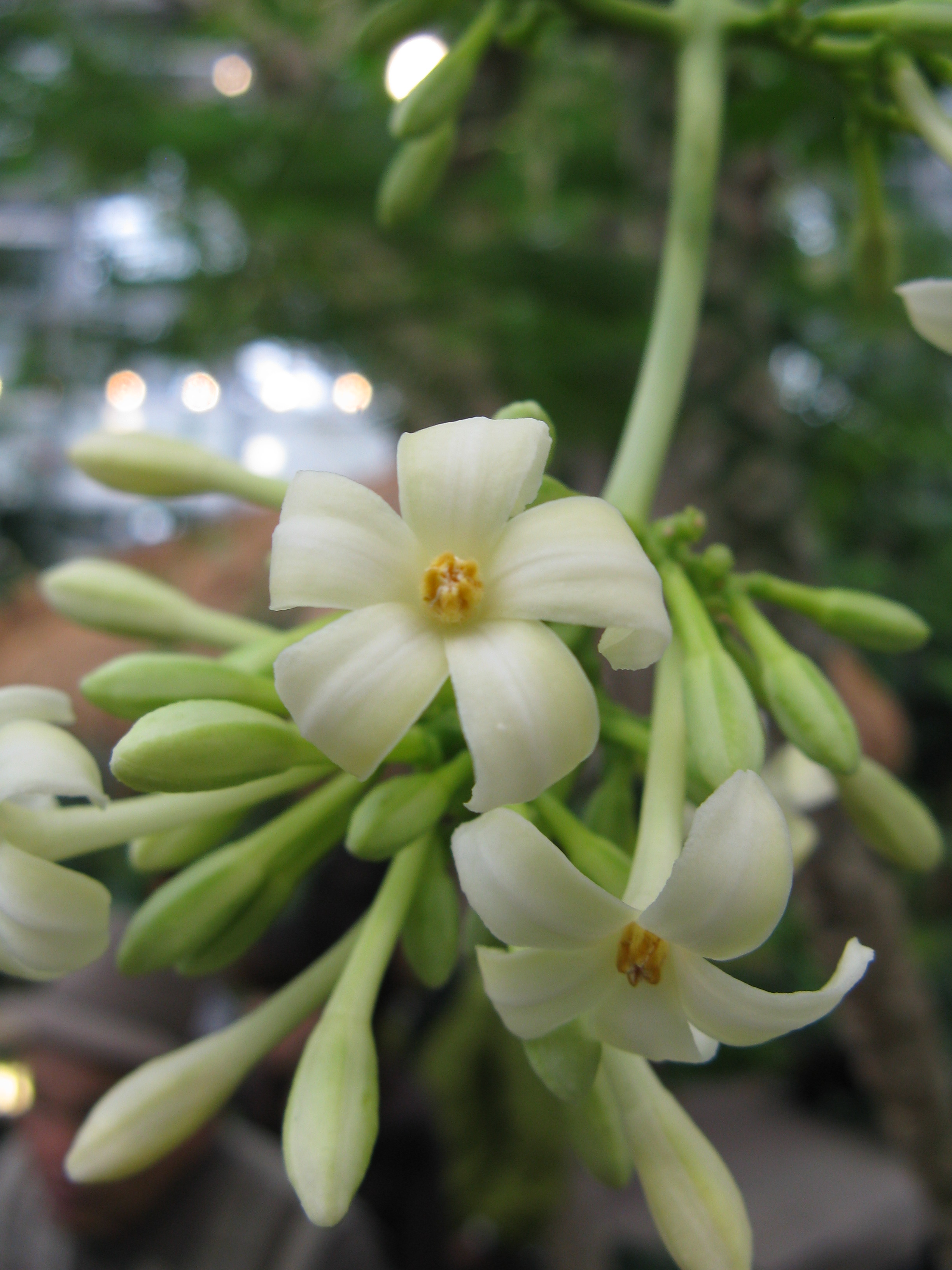 Scientific name Carica papaya